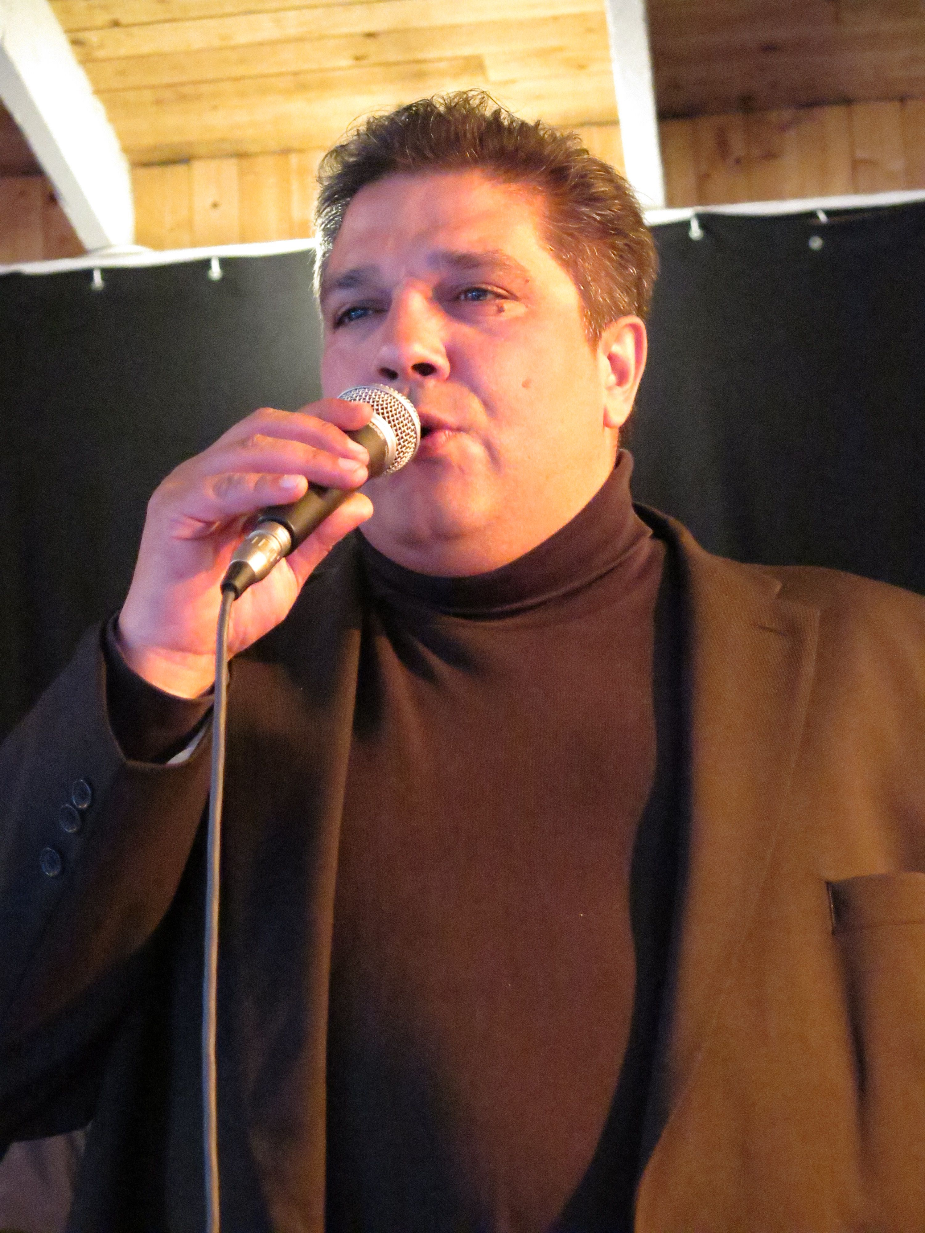 Sebastian ahlgren suomalainen laulaja